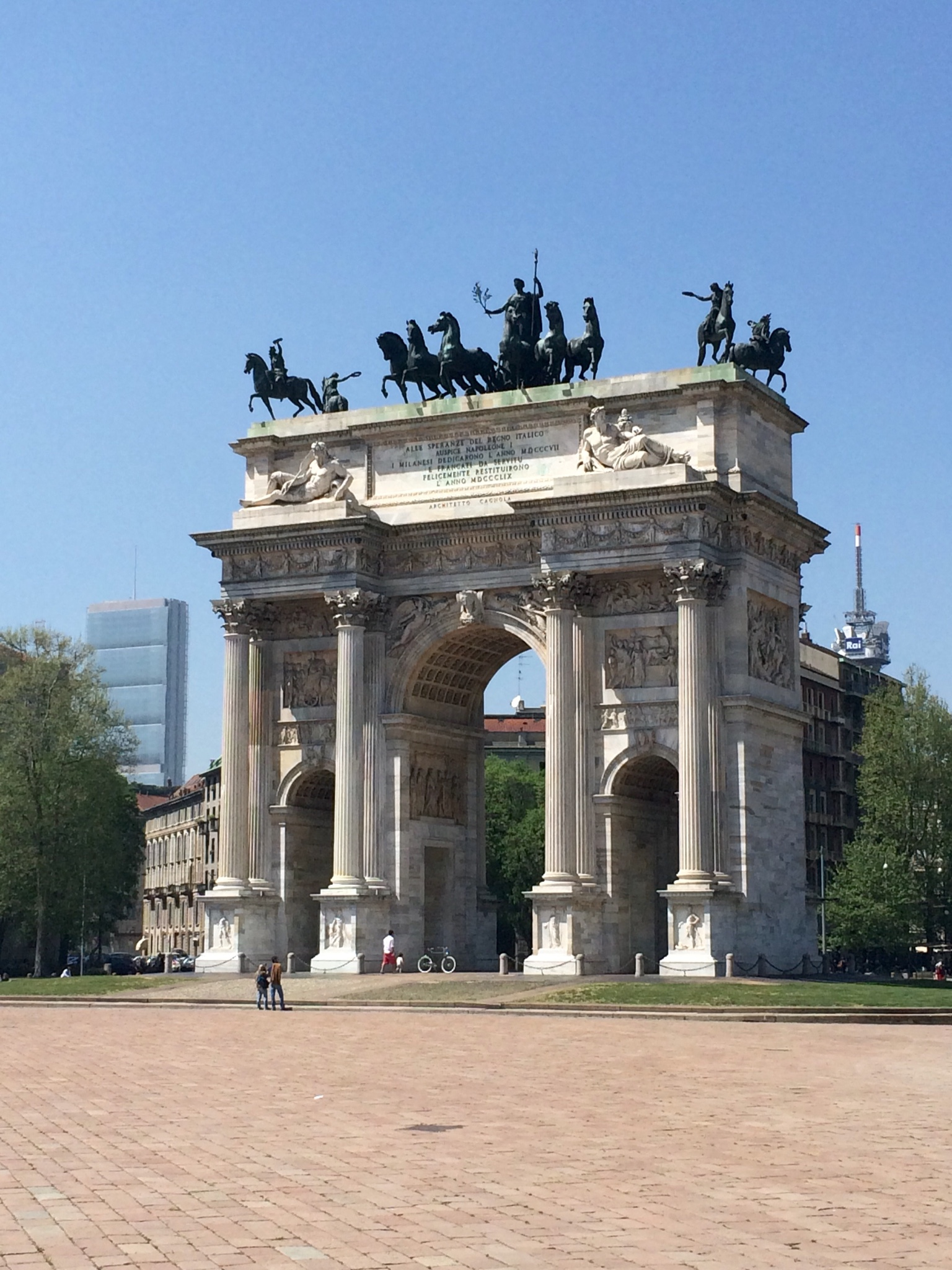 Arco della Pace, Milan